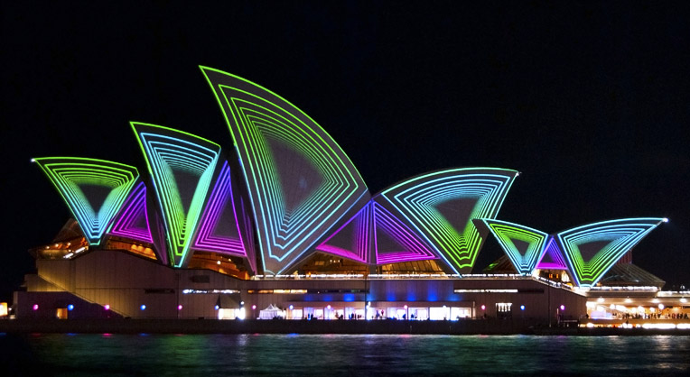 Vivid Sydney 2011